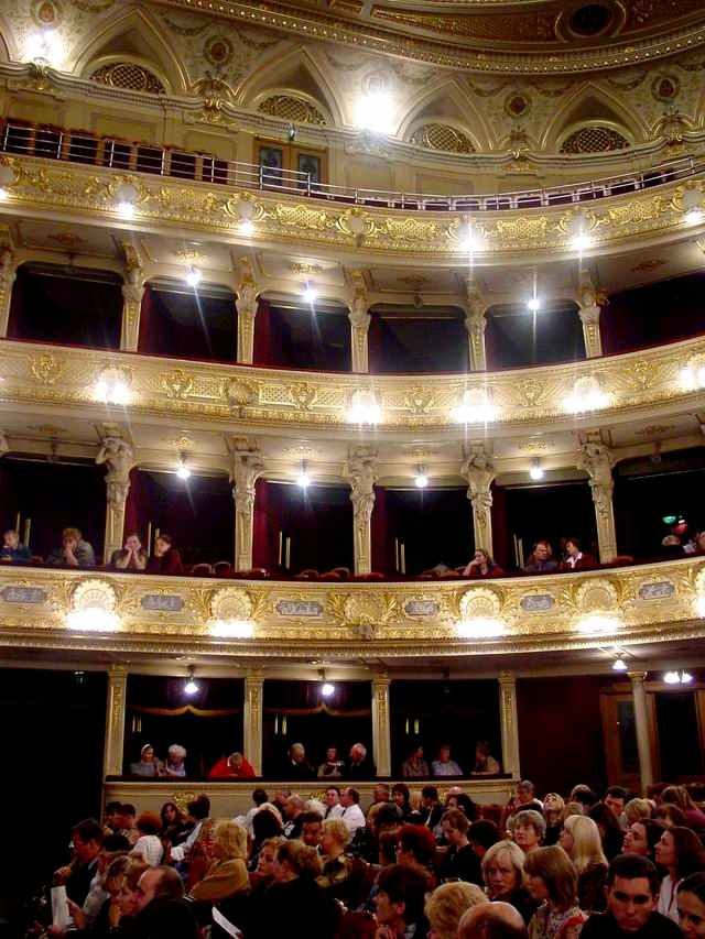 Widownia Teatru Wielkiego we Lwowie - fotografia wykonana we wrzesniu 2003